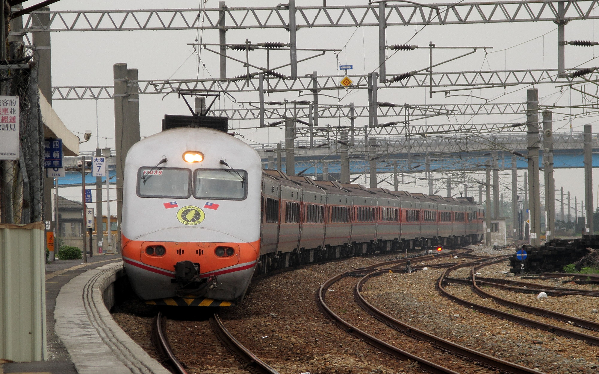 從臺灣鐵路管理局大湖車站第二月台B側拍攝進站的推拉式自強號，車頭為電力機車E1039。